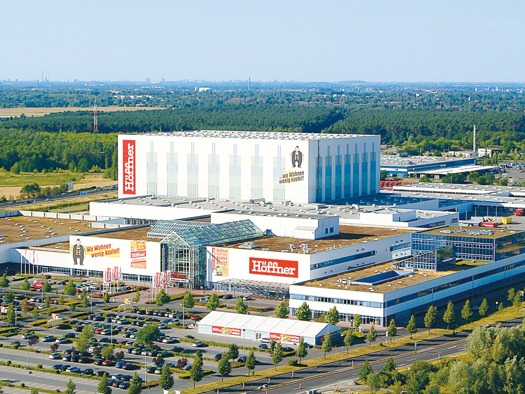 Möbel Höffner Zentrale in Schönefeld